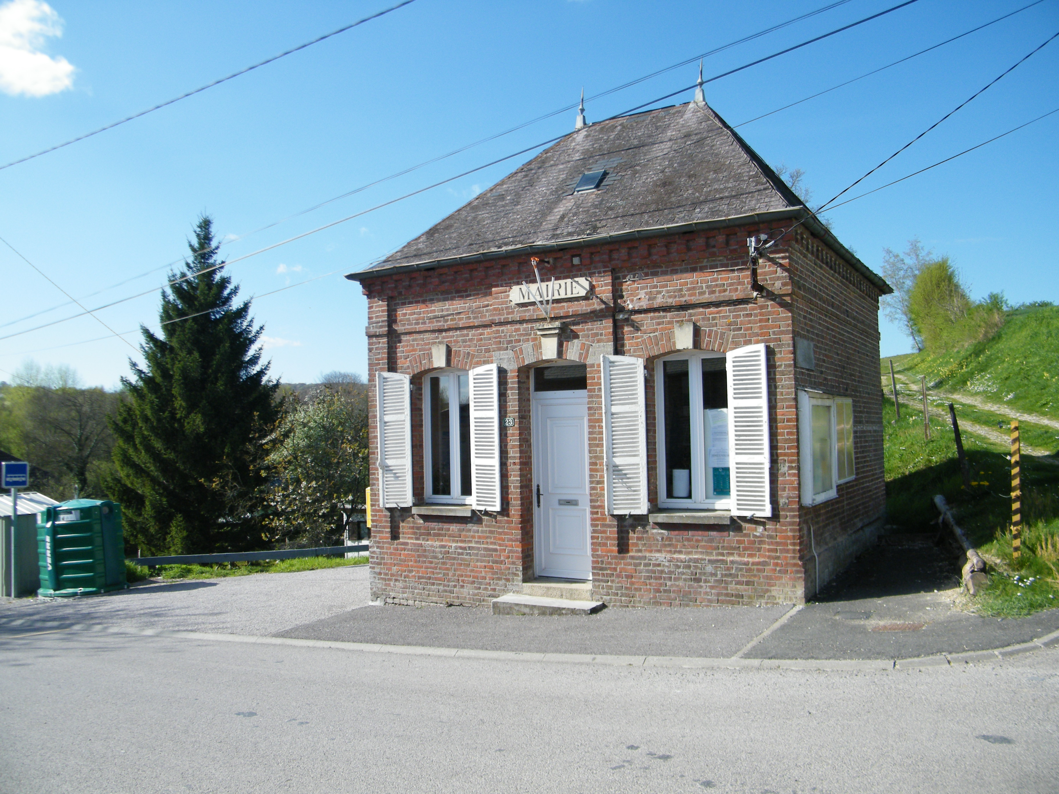 Mairie.